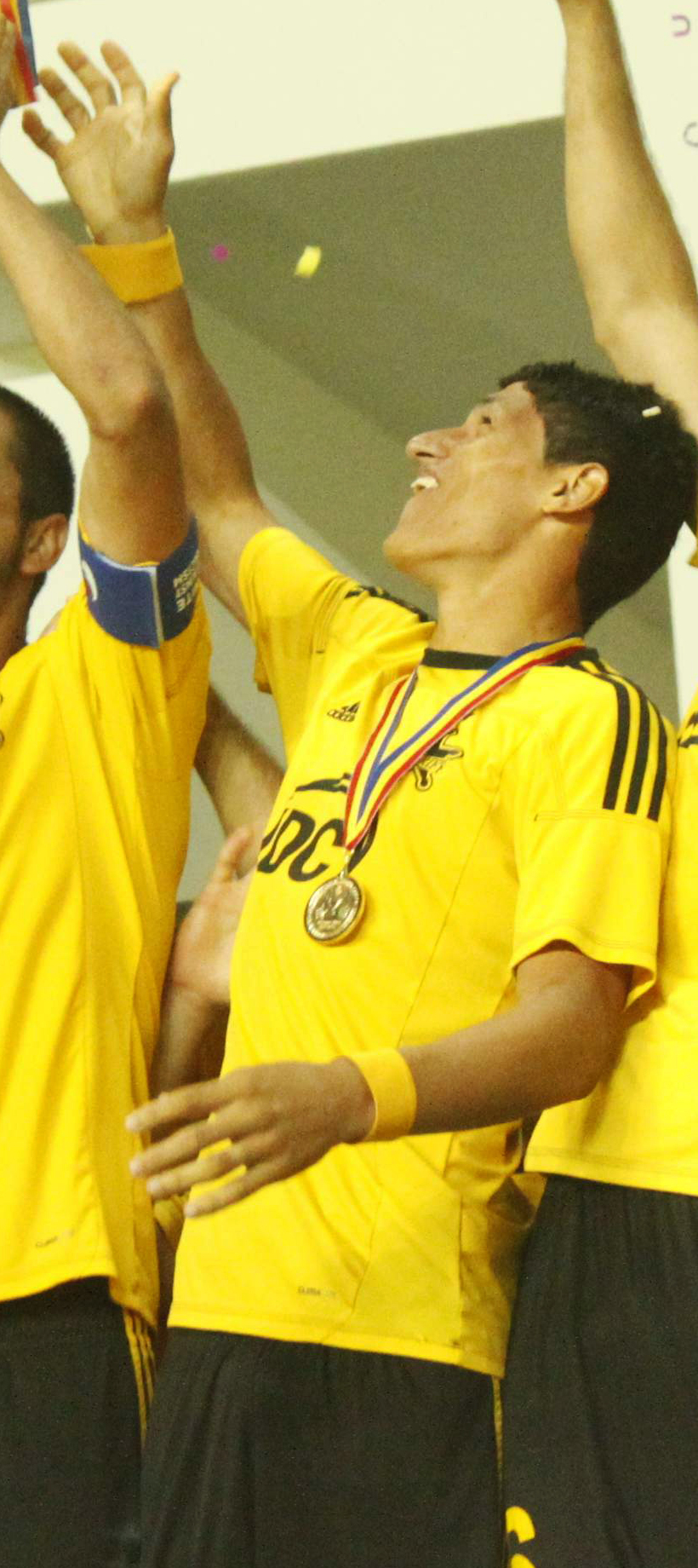 ФК Шериф - обладатель Суперкубка Молдавии 2013